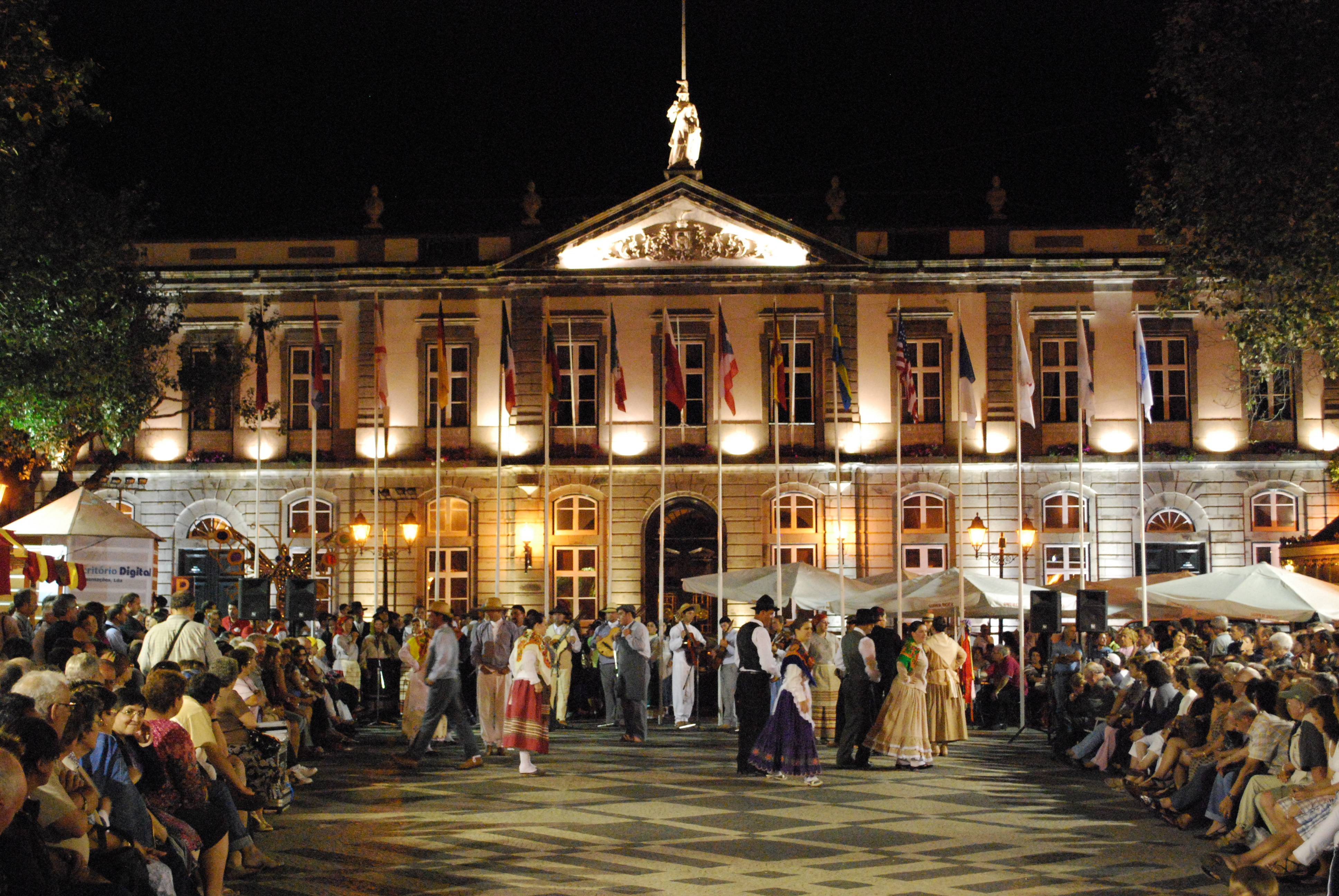 Danças na Praça Velha em frente dos Paços do Concelho de Angra do Heroísmo, durante o XXVI Festival Internacional de Folclore dos Açores.